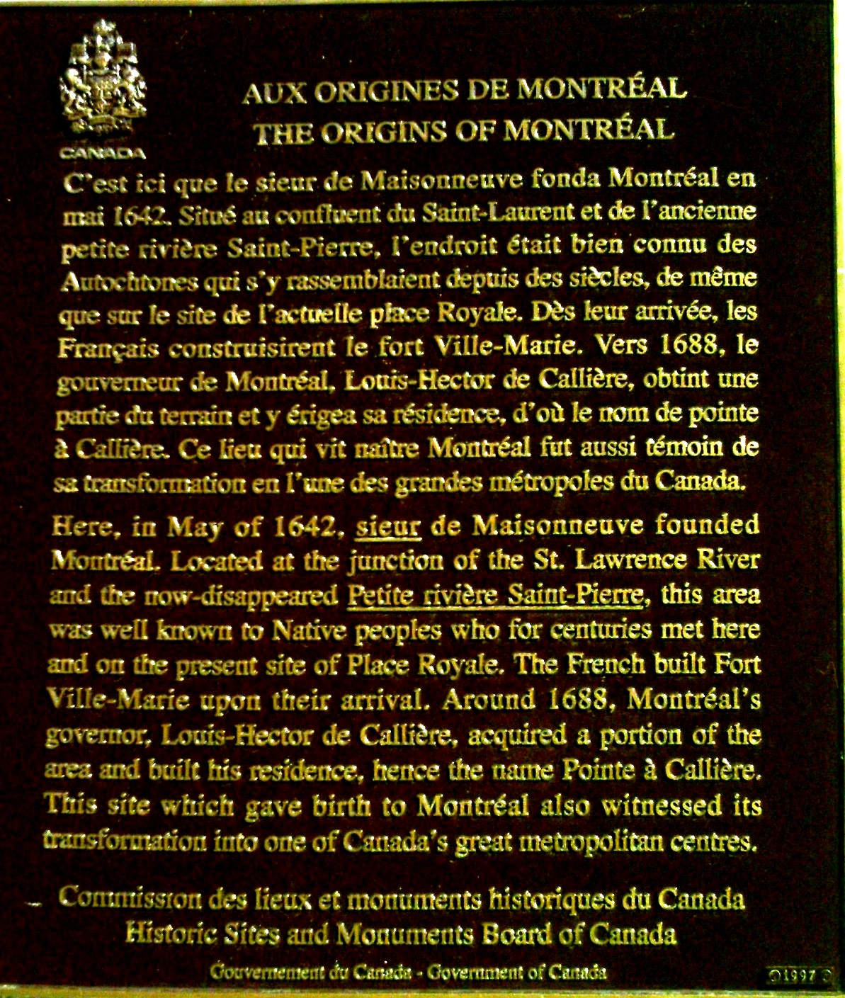 Plaque apposée à l'Éperon de Pointe-à-Callière où il est écrit que cet endroit fut le lieu d'origine de Montréal